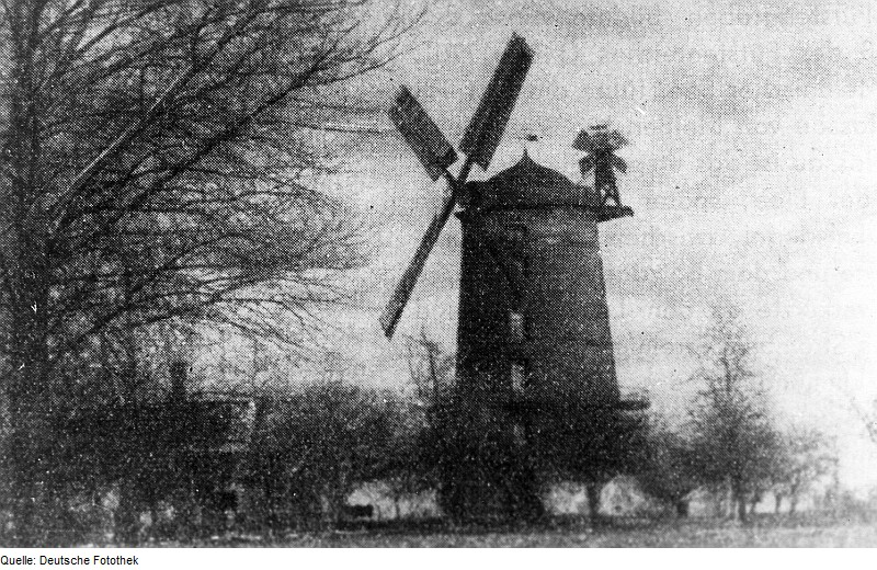 Original image description from the Deutsche Fotothek Meißen-Proschwitz. Proschwitzer Windmühle, aus: Meißner Heimat, März 1960